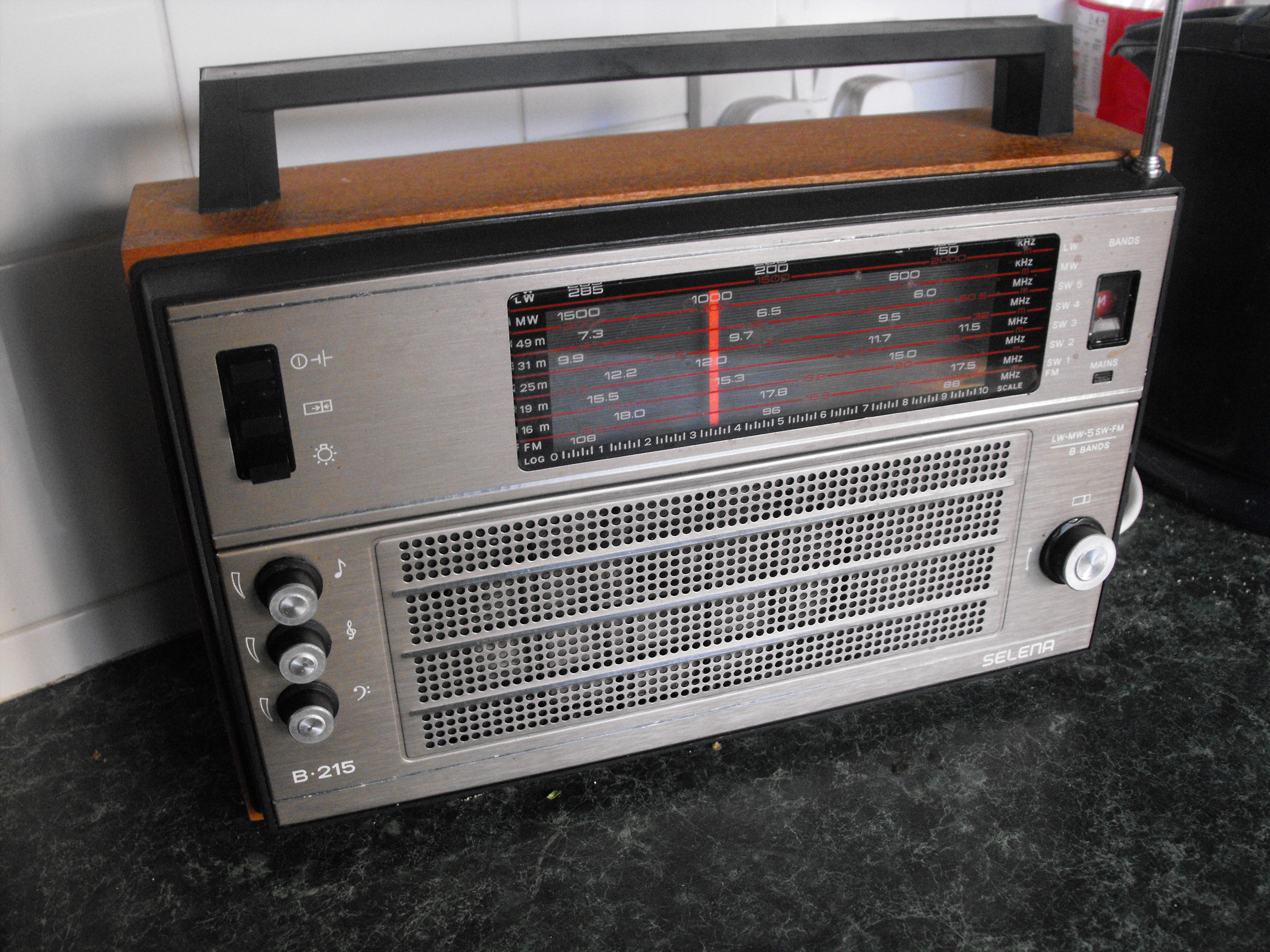 Soviet/Byelarussian receiver Selena V-215